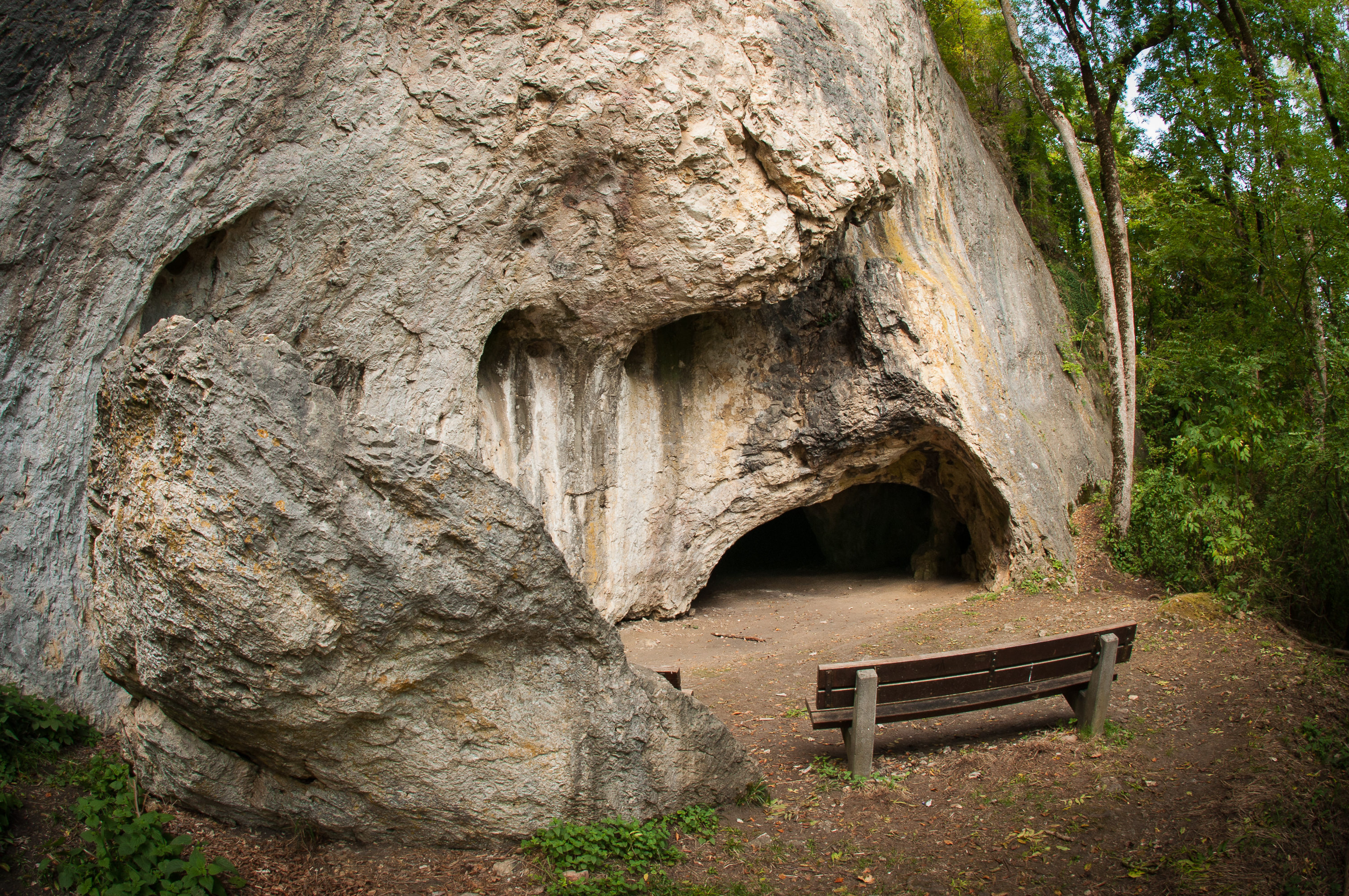 Die Sirgensteinhöhle im Achtal zwischen Schelklingen und Blaubeuren.